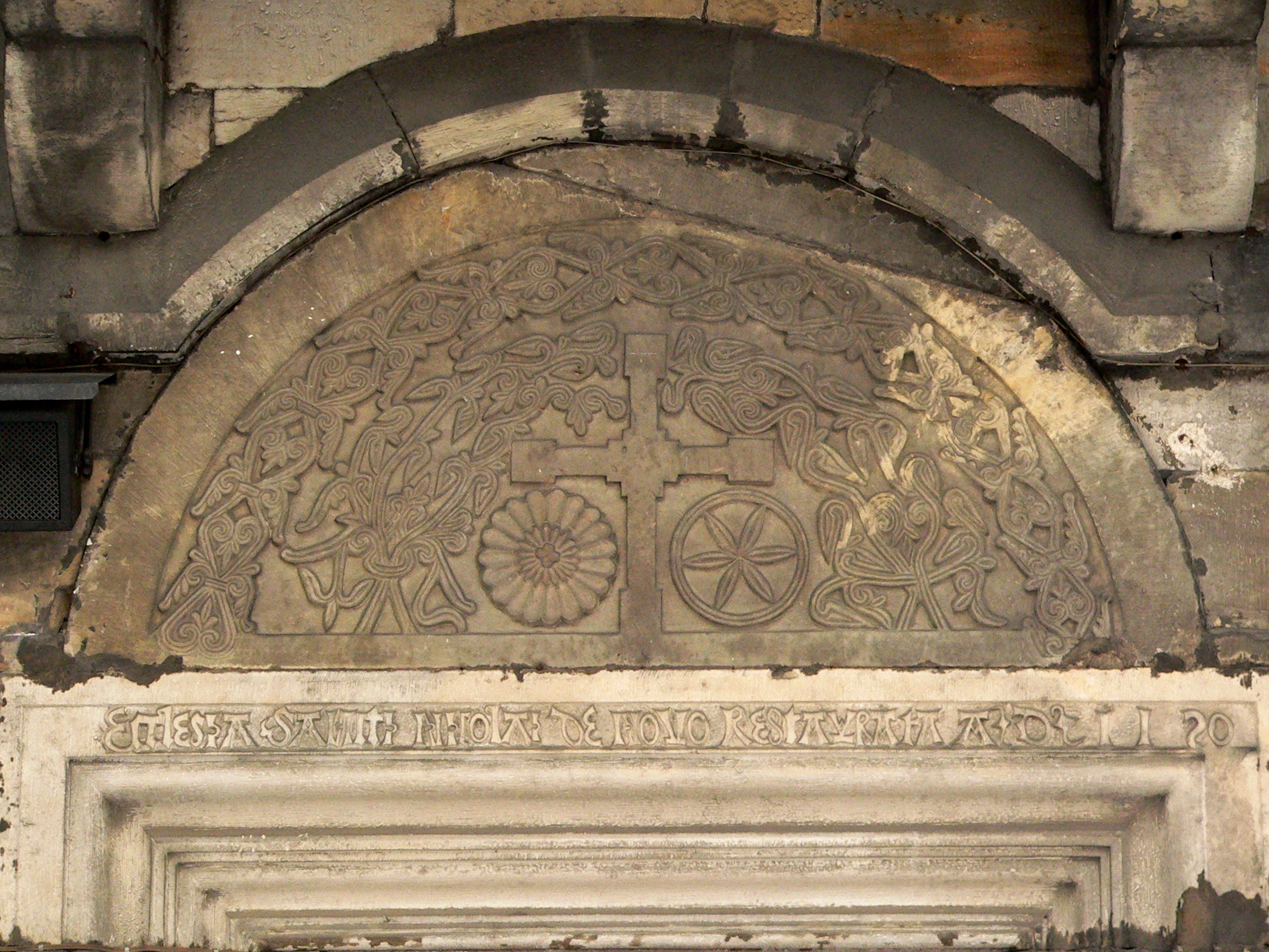 Description - Romanesque tympanum above the side door of the Gothic St. Nicholas & St. Adalbert parish church in Końskie. Opis - Romański tympanon nad południowym wejściem do kolegiaty pw. św. Mikołaja i Wojciecha w Końskich. Source - picture taken in February, 2006 and uploaded by Marek K. Misztal